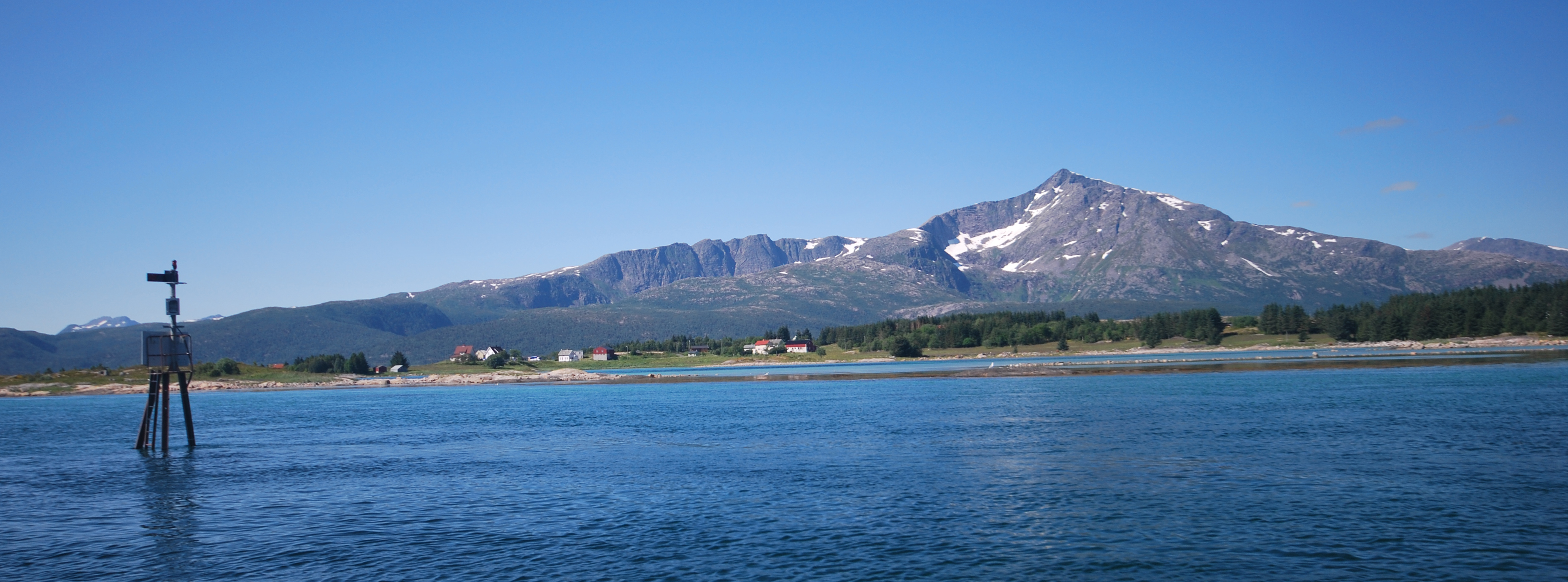 Kjerstad på Tjeldøya (Tjeldsund kommune) med Tjeldsundet og Strandtinden (1076 meter) i Lødingen kommune i bakgrunnen